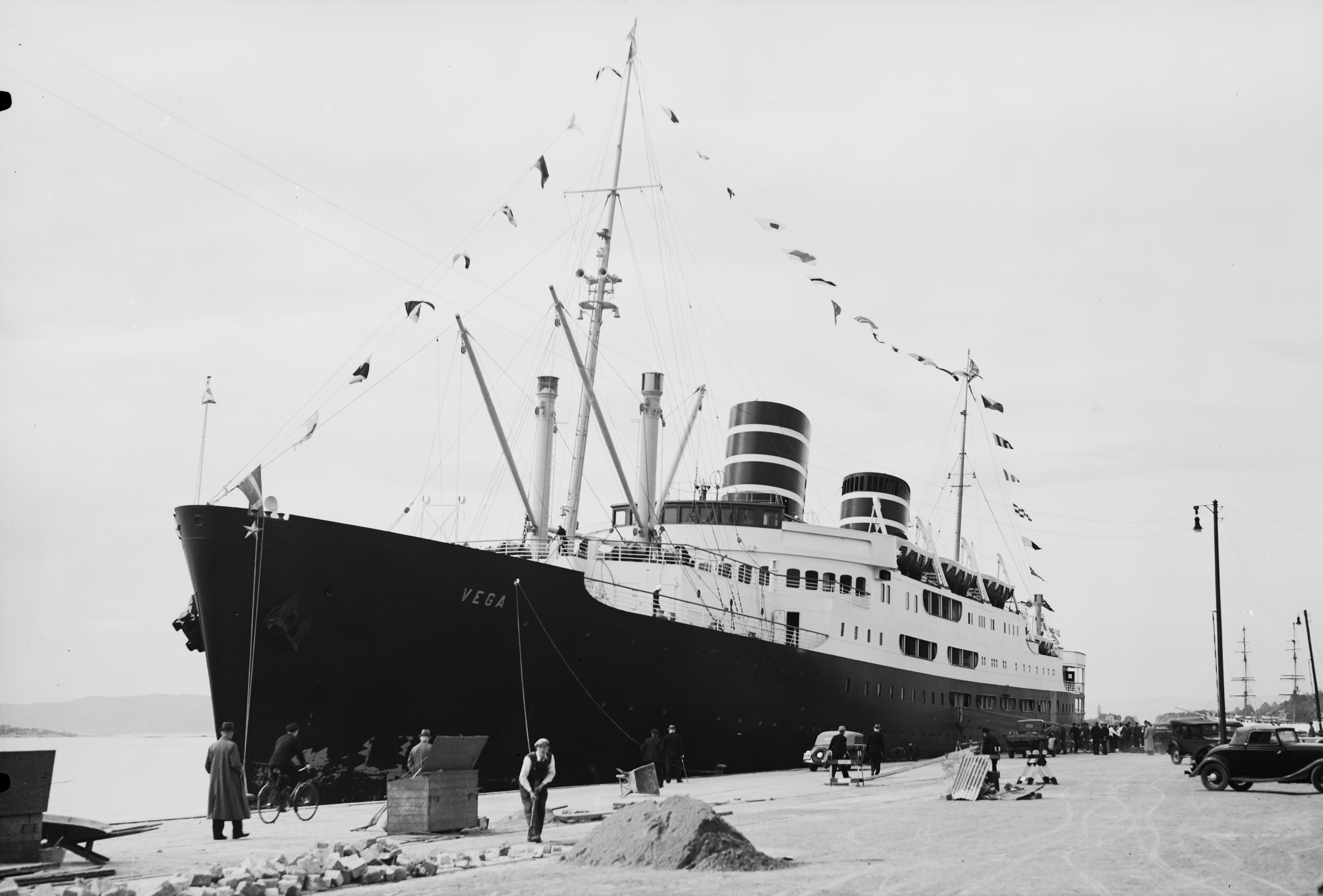 Bildet er hentet fra Nasjonalbibliotekets bildesamling " Vega " ved bryggen